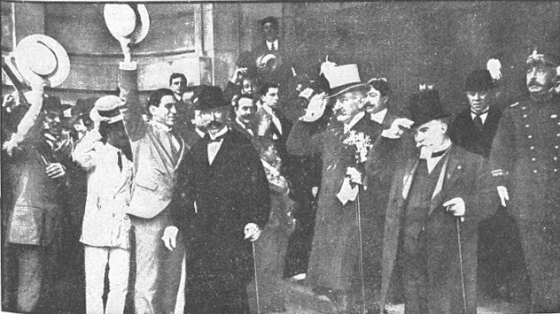 El Presidente Roque Saenz Peña (con sombrero claro y flores en el pecho) junto al Gobernador José Arias (de barba blanca y sombrero negro) junto al Jefe de Policía General Arana y al Doctor Tarquini, Sr. Oliver y otros. En la Plata.